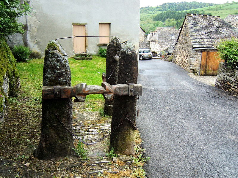 ferradou au Bleymard en Lozère